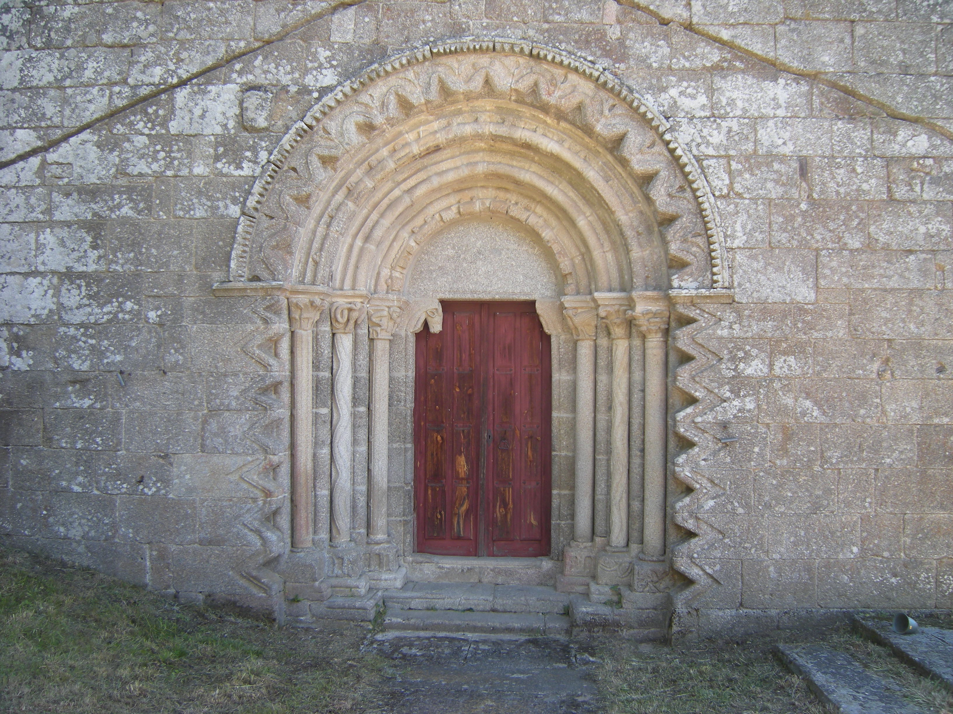 Portada occidental.